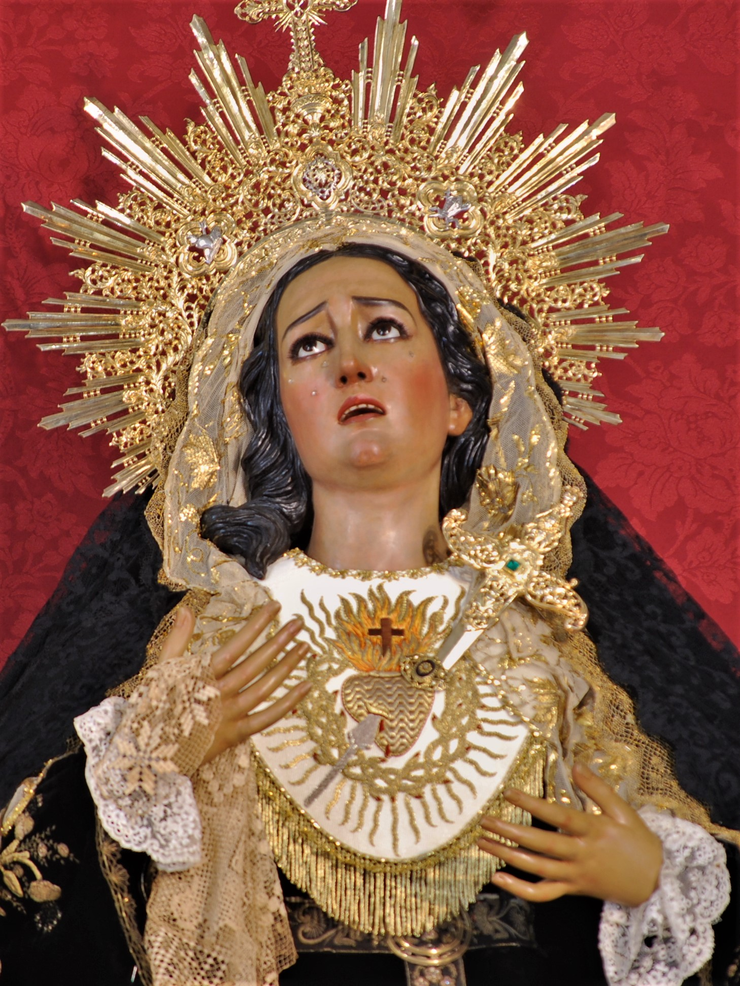 Imagen de Nuestra Madre de la Consolación y Correa en sus Dolores. Titular de la Hermandad de la Buena Muerte de Huelva. Recibe culto en el Convento de Santa María de Gracia de las Madres Agustinas. Fue tallada por Joaquín Gómez del Castillo en 1941